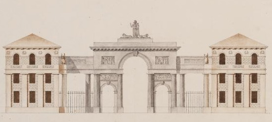 Entwurf von Heinrich Christoph Jussow für das Wilhelmshöher Tor in Kassel, um 1805 Graphit/Feder auf Papier, 26,3 x 42 cm Staatliche Museen Kassel Inv.: GS 5863